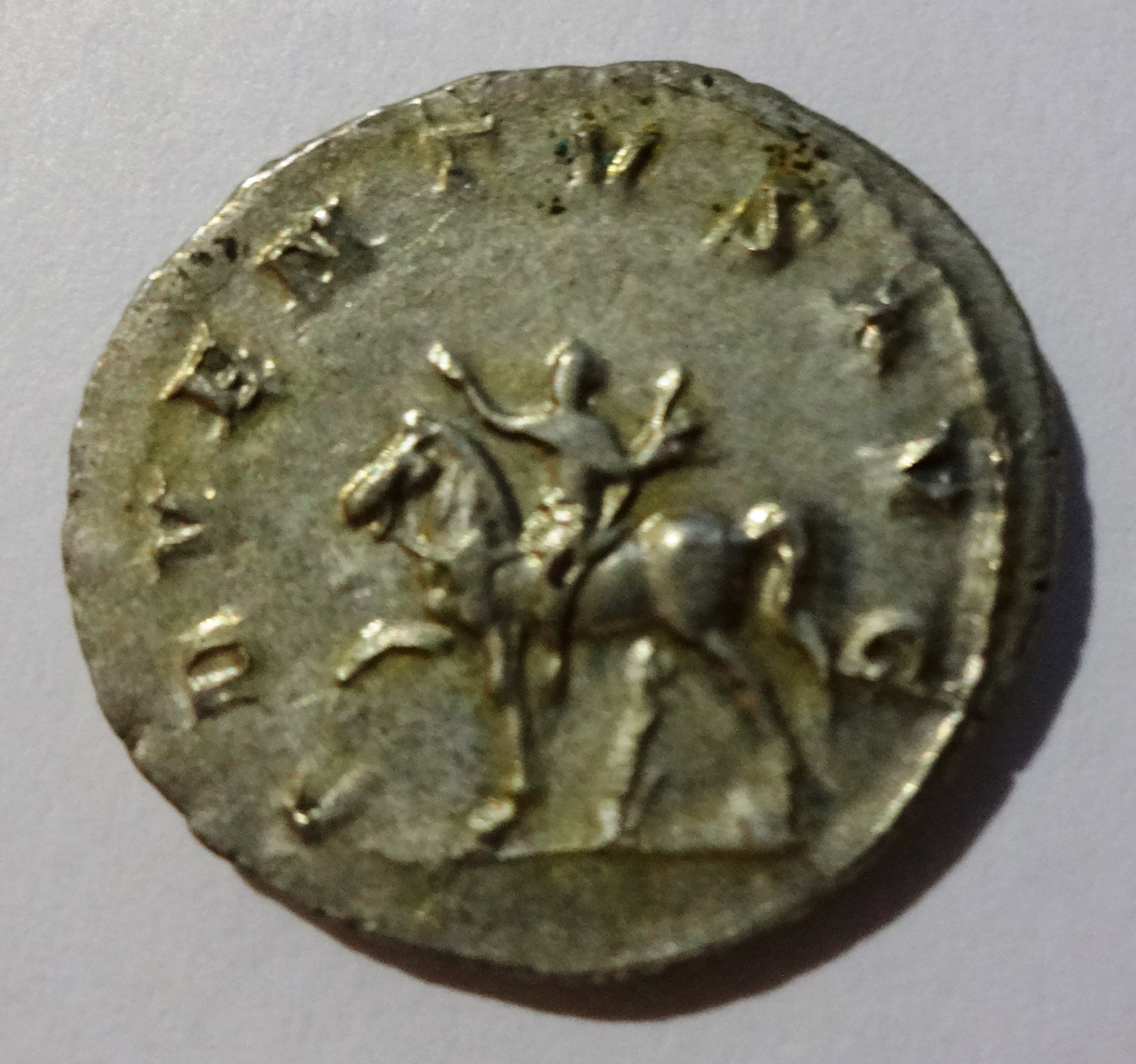 Rückseite Antoninian des Trajanus Decius, Umschrift ADVENTVS AVG, Kampmann 79.2